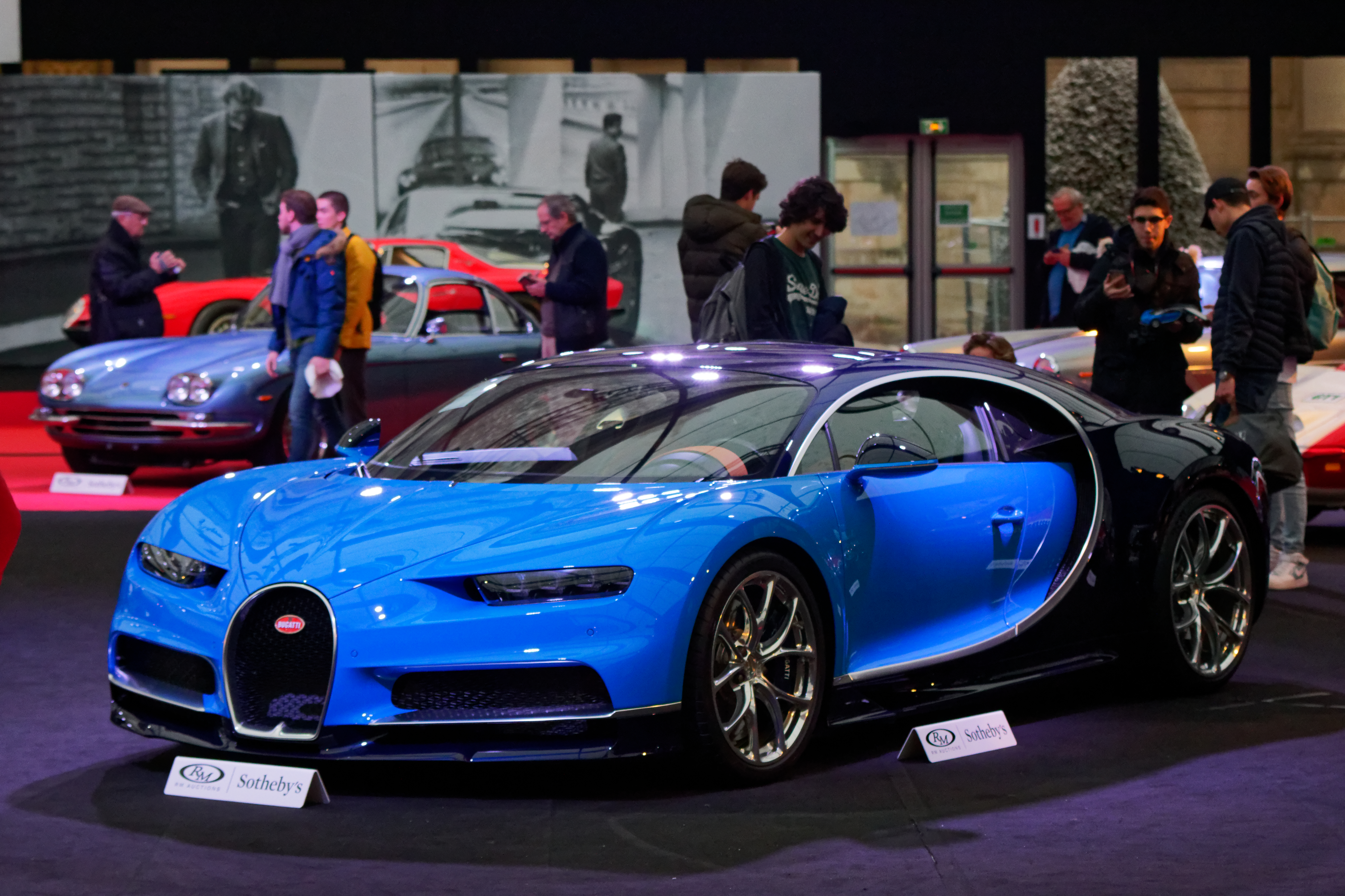 Un véhicule exposé lors de la vente RM Sotheby’s 2018 aux Invalides à Paris.